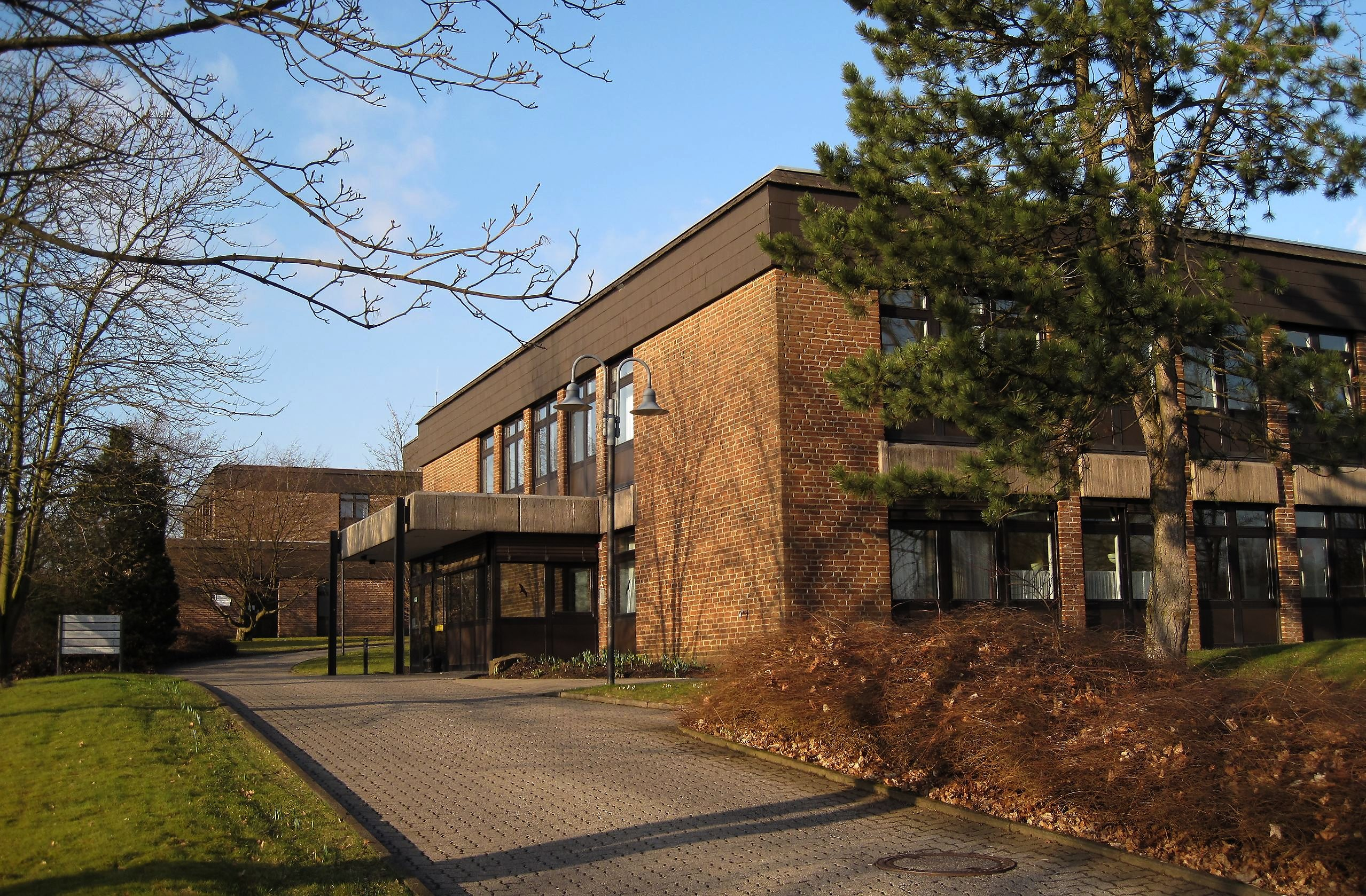 Eingangsbereich der Hans-Prinzhorn-Klinik in Hemer-Frönsberg.